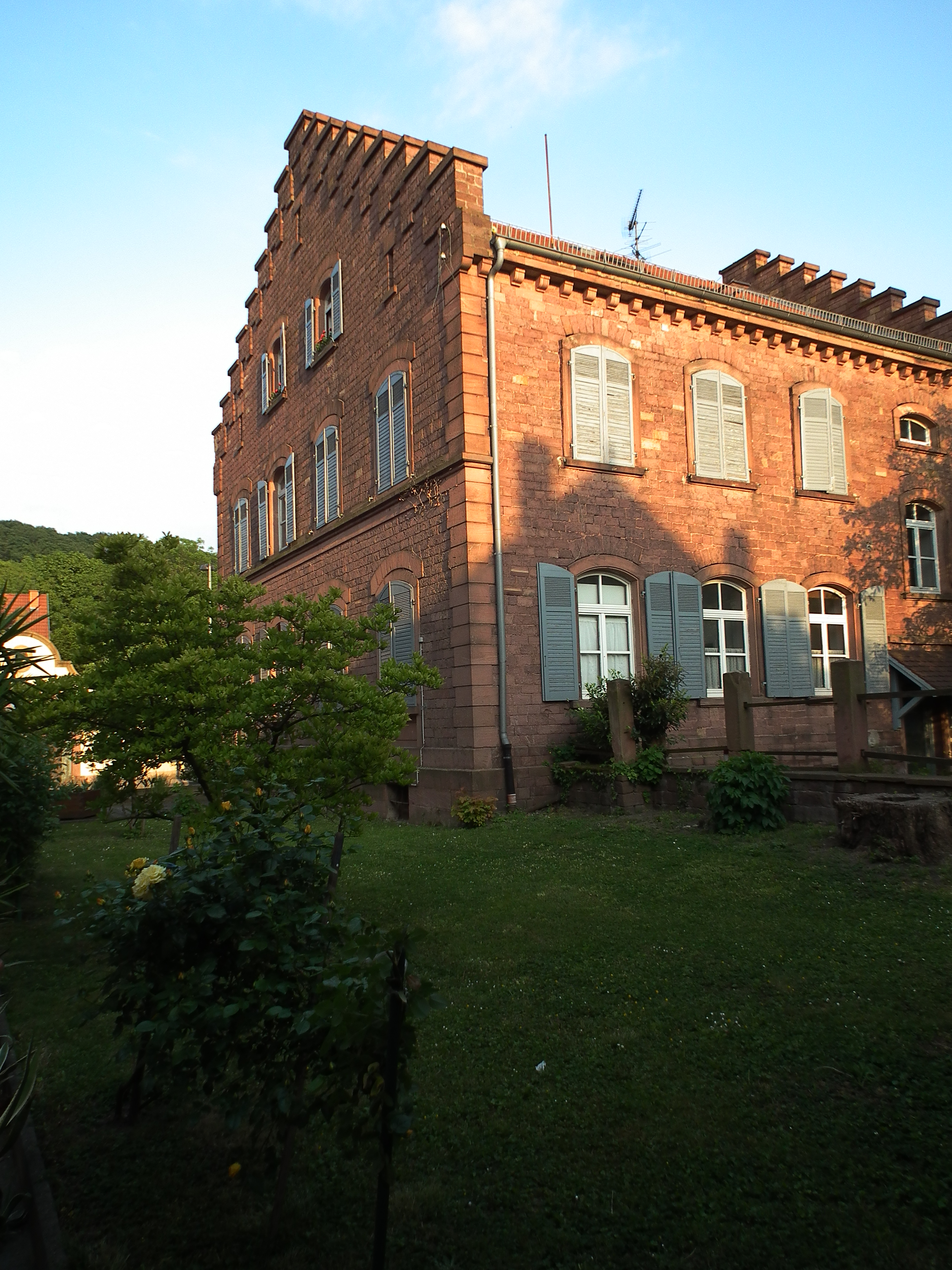 Haus mit Treppengiebel in Nußloch (Baden-Württemberg, Deutschland)